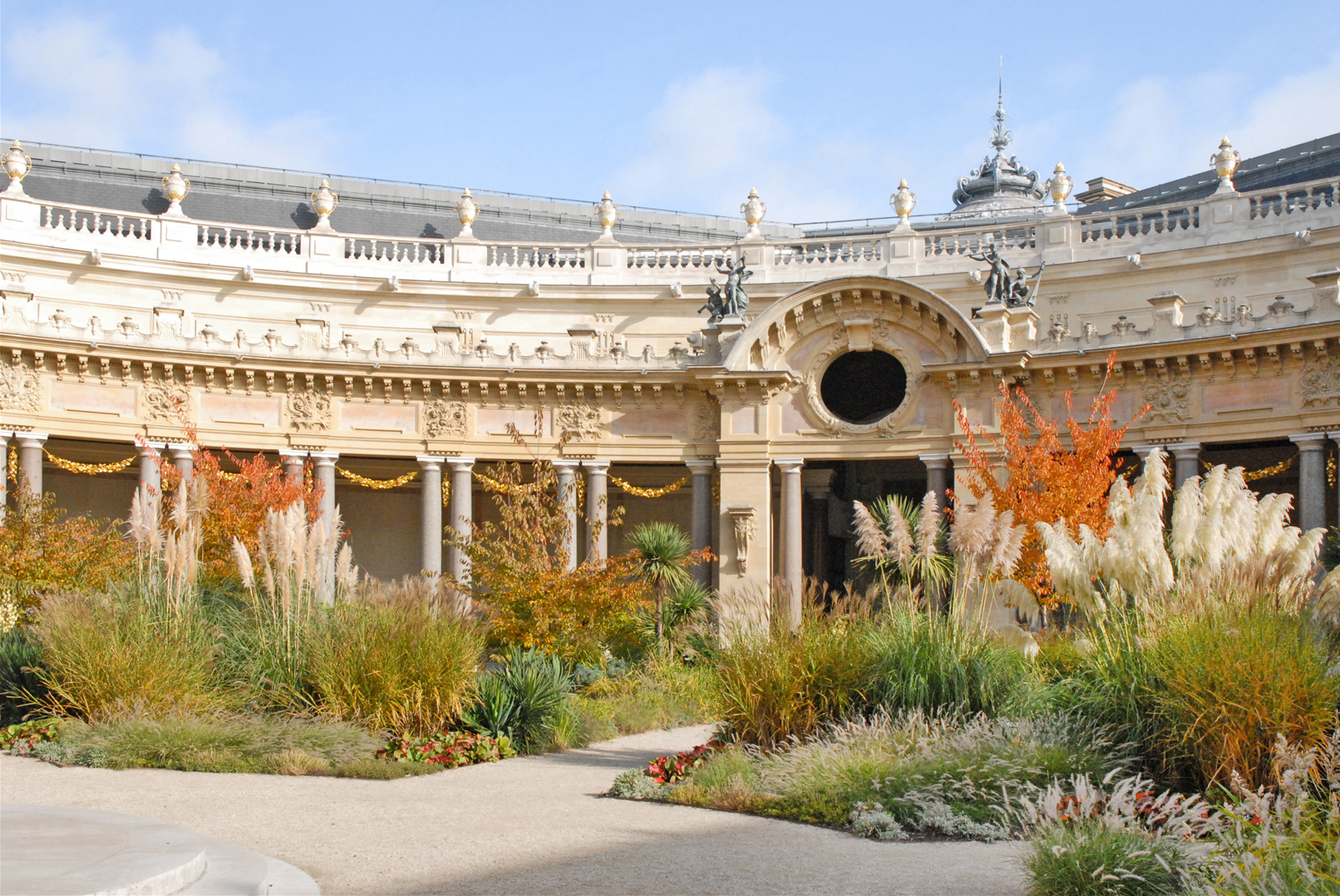 Le jardin intérieur et le péristyle du Petit Palais à Paris. L'architecte du Petit Palais est Charles Girault (1851-1932) Construit pour l'Exposition Universelle de 1900, face au Grand Palais, le Petit Palais est devenu un musée en 1902. Il renferme le musée des Beaux-Arts de la ville de Paris.